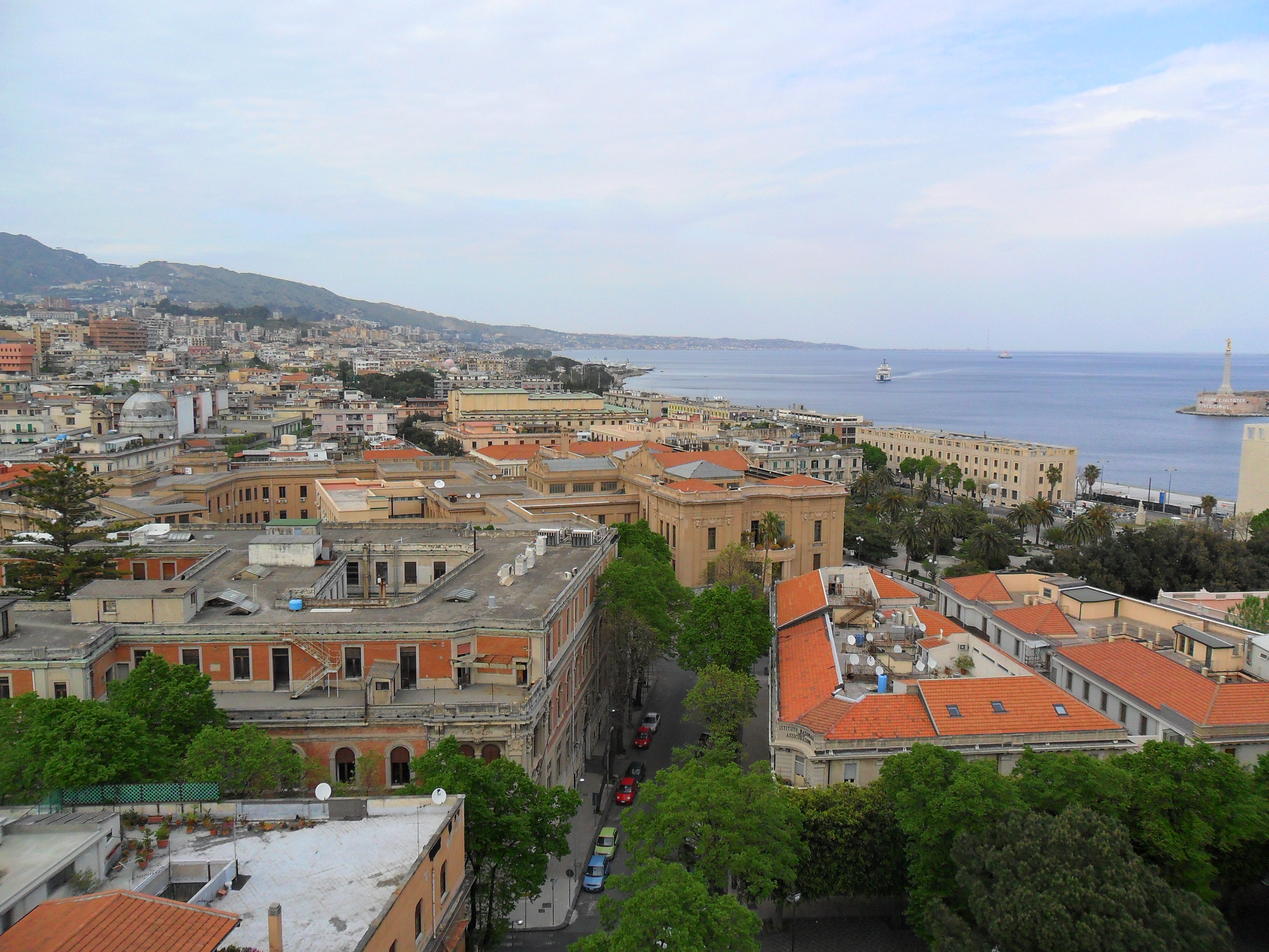 Panorama di parte della città dal campanile del duomo